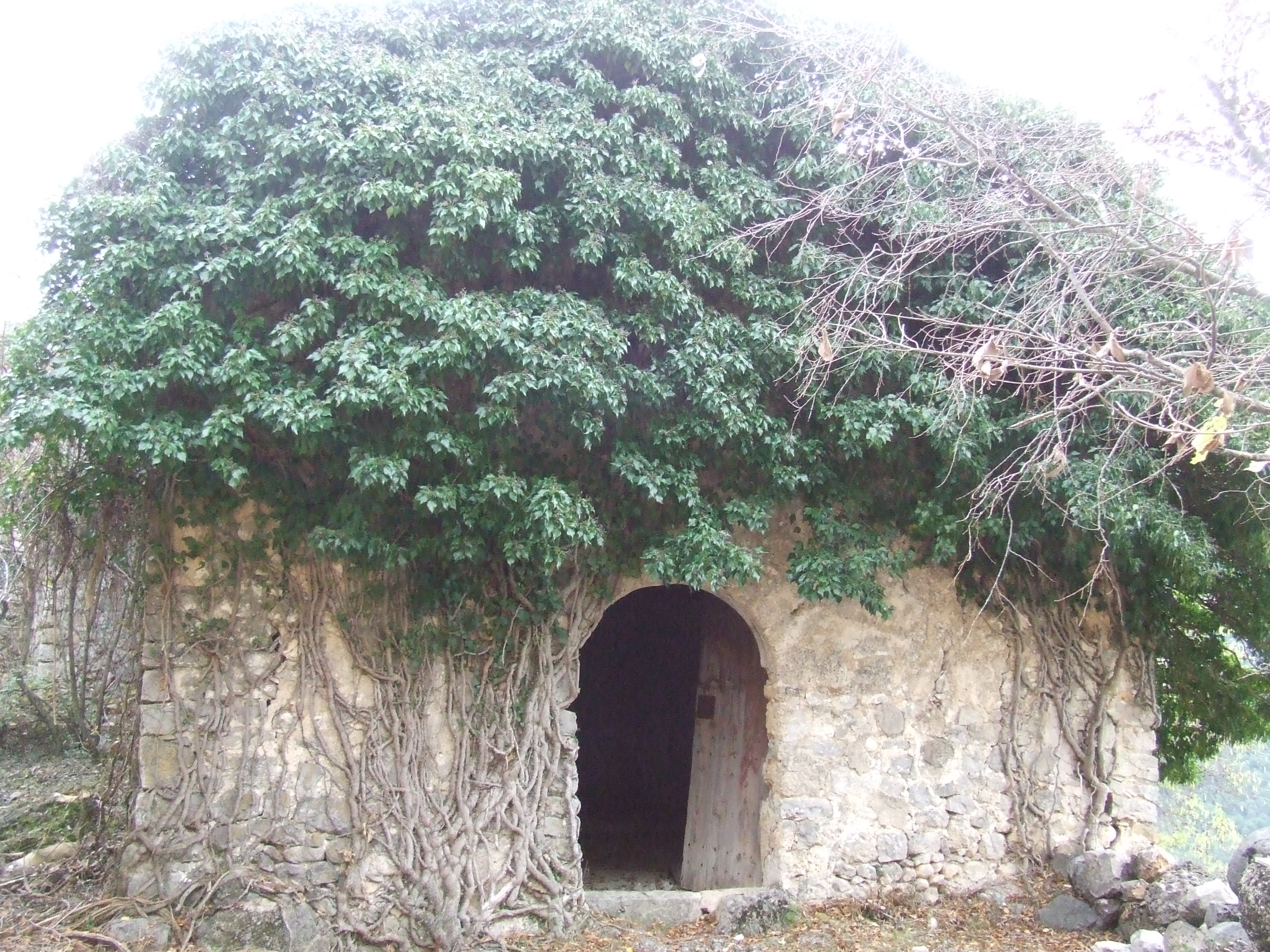 L'església de Sant Miquel d'Herba-savina (Hortoneda de la Conca, Conca de Dalt, Pallars Jussà) — Catalonia - Spain.